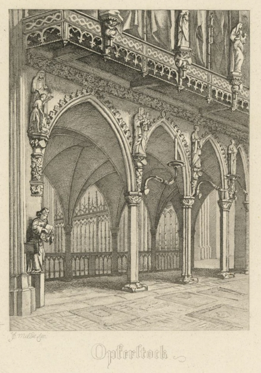 Der Opferstock am Lettner der Lübecker Marienkirche; Blatt aus Carl Julius Mildes Lübecker ABC